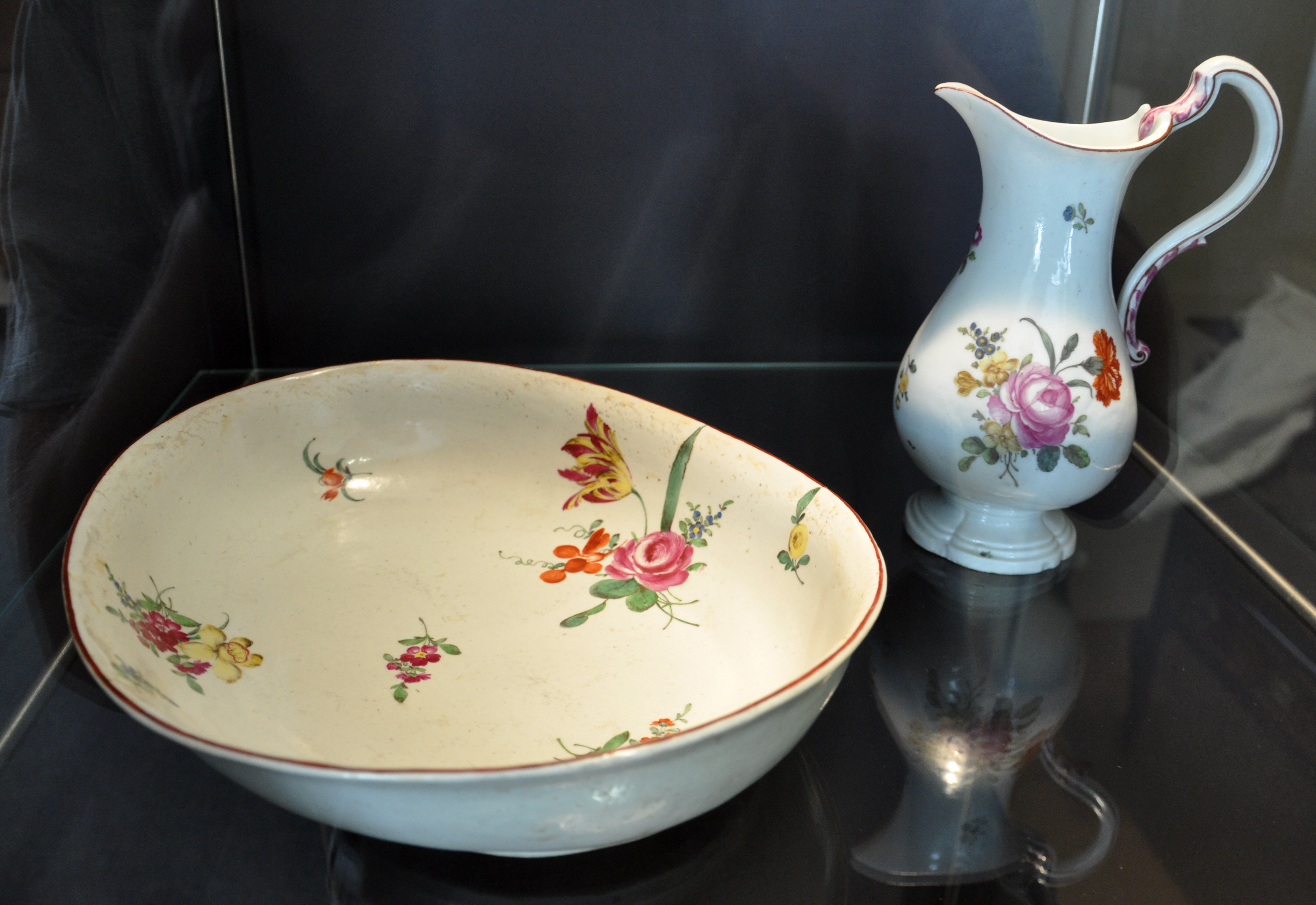 Waschgarnitur, Ludwigsburger Porzellan, um 1765 Ausstellung "Das stille Örtchen – Tabu und Reinlichkeit bey Hofe" der Staatlichen Schlösser und Gärten Baden-Württemberg, Bad Schussenried; Staatliche Schlösser und Gärten Baden-Württemberg, Inv. Nr. Schl. L. 3136